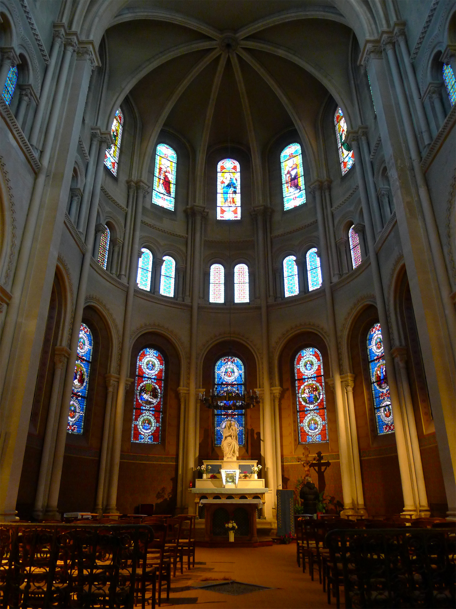 Église Saint-Ambroise (chapelle de la Vierge) - Paris XI